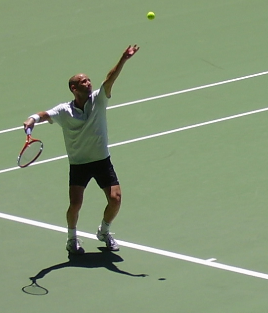 阿加西在2005年澳网。